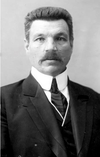 Дмитрий Иванович Шаховский (Шаховско́й; 1 июня 1866, Смоленская губерния — после 1917) — подпоручик, судья, депутат IV Государственной Думы от Пермской губернии (1912—1917).